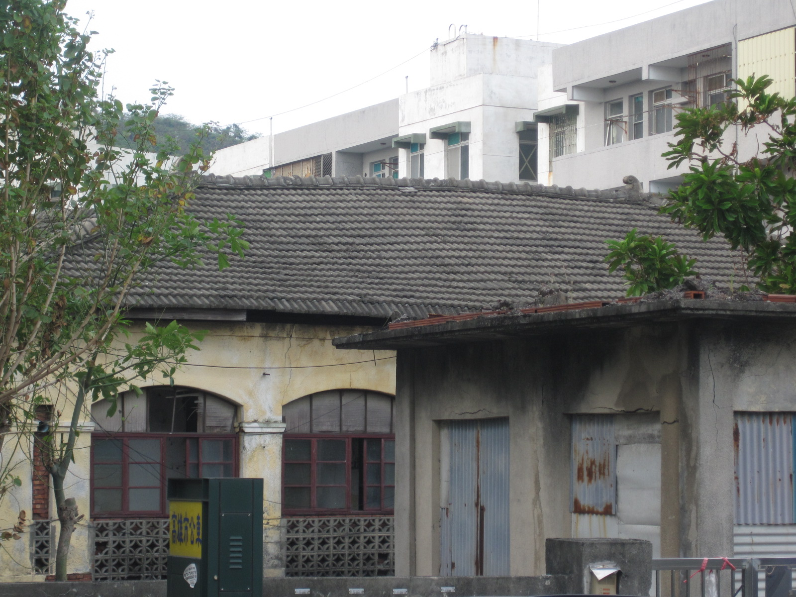 高雄州水產試驗場